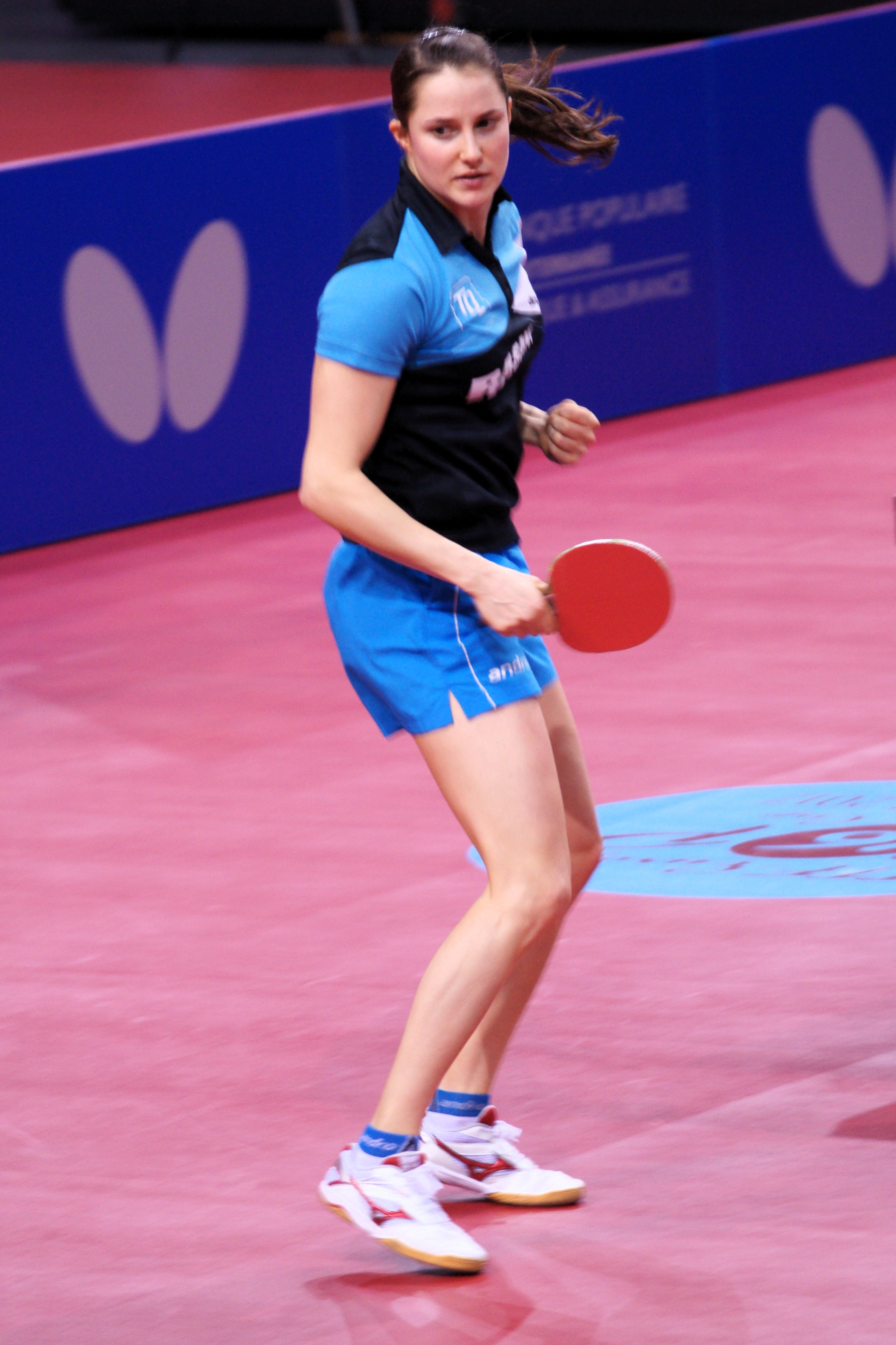 Sabine Winter, Top 16 Antibes 2017